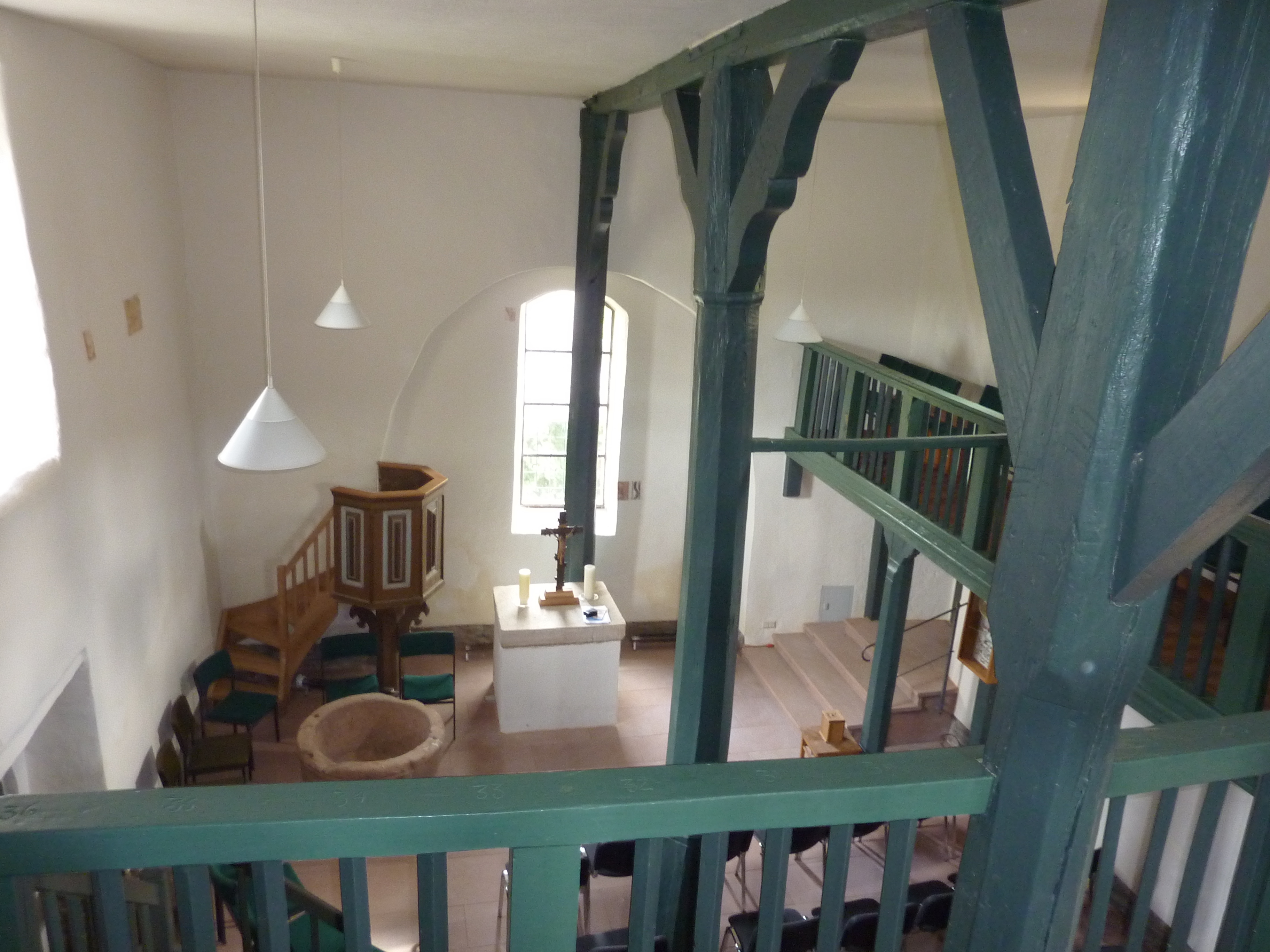 Alte Kirche Innenraum